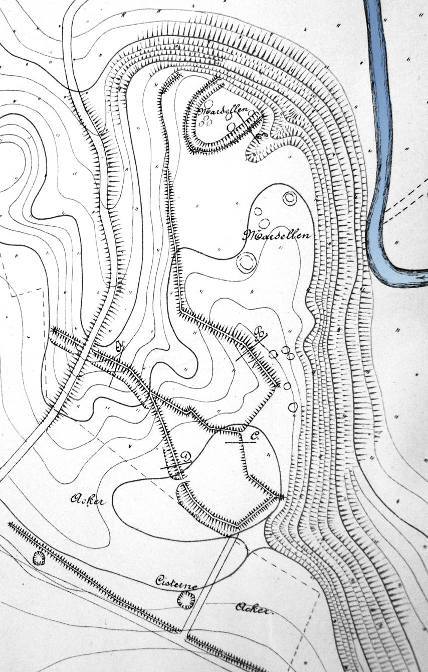 Pipinsburg